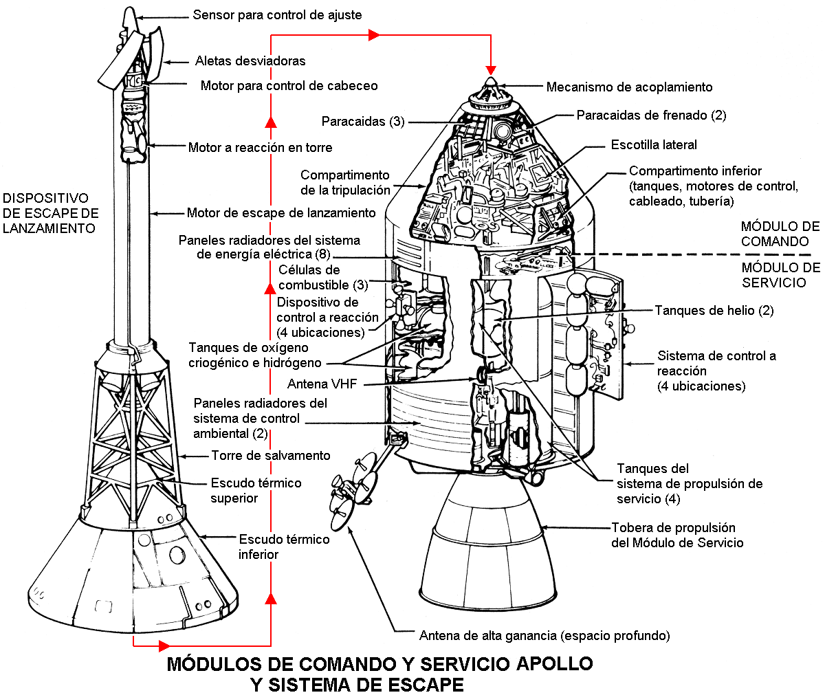 Esquema del acoplamiento del Módulo de Comando con el Módulo de Servicio y Torre de Salvamento empleados en el Programa Apollo de la NASA.